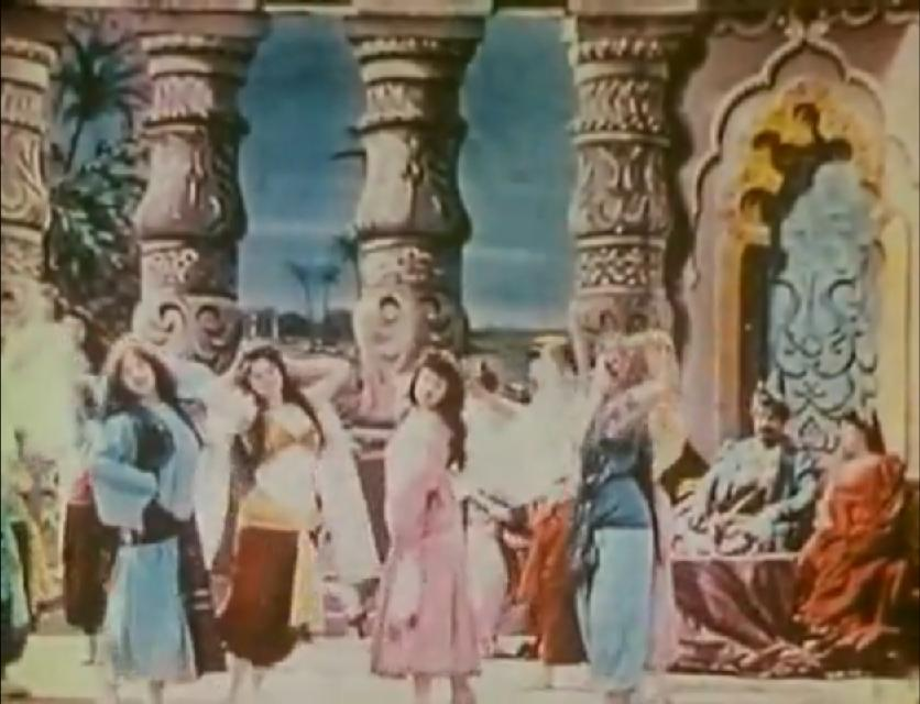 Dance scene at the home of Ali Baba